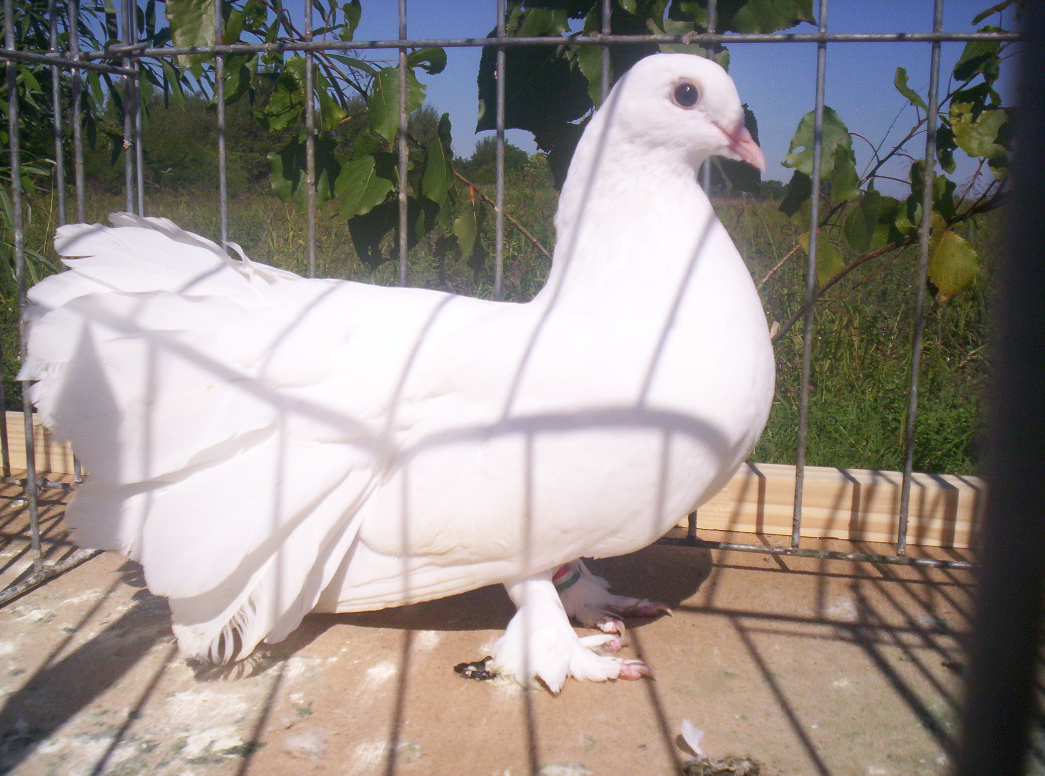 Magyar páva – photo taken by uploader User:Csanády in 2006.